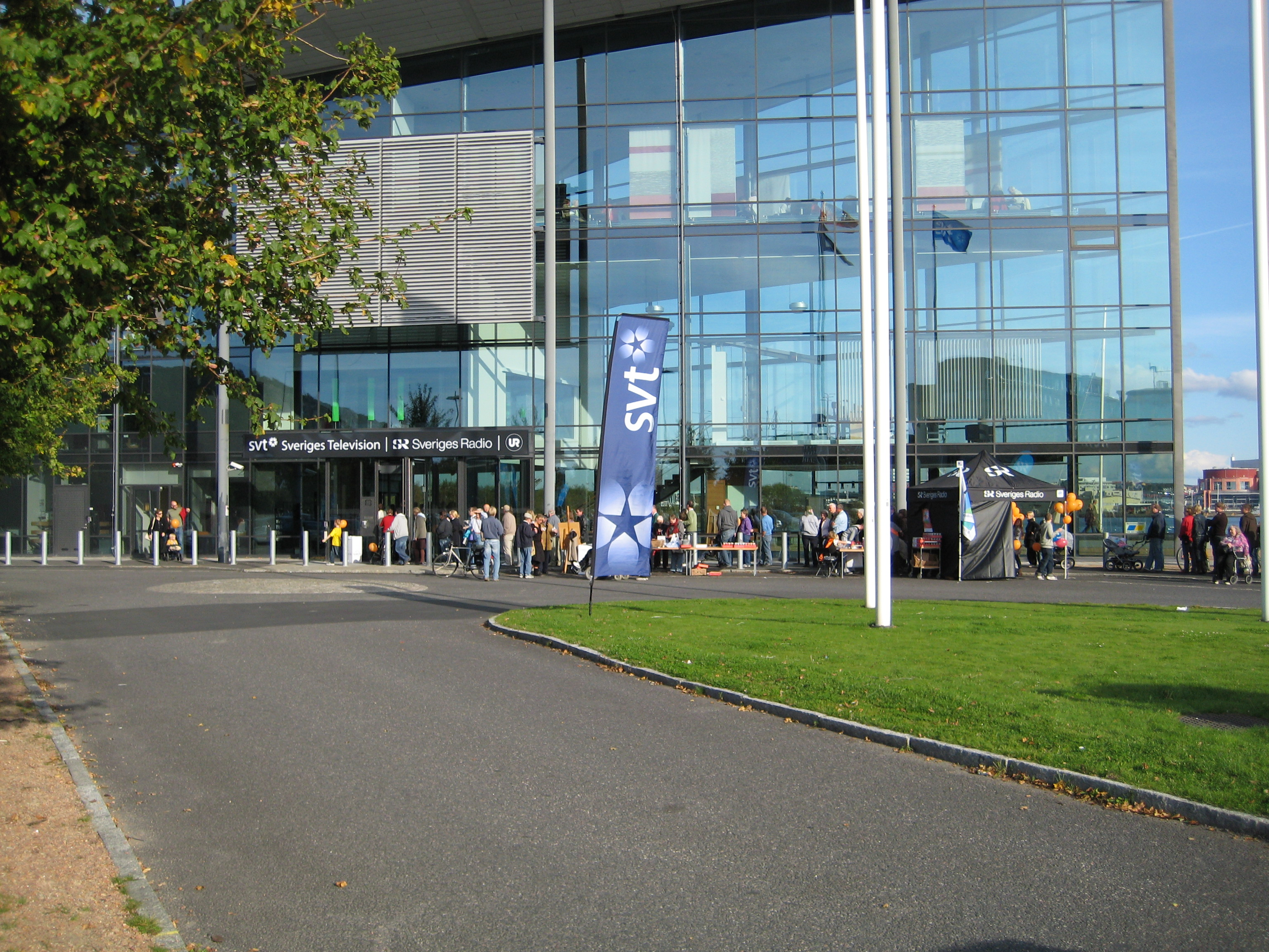 Sveriges Television Channel House